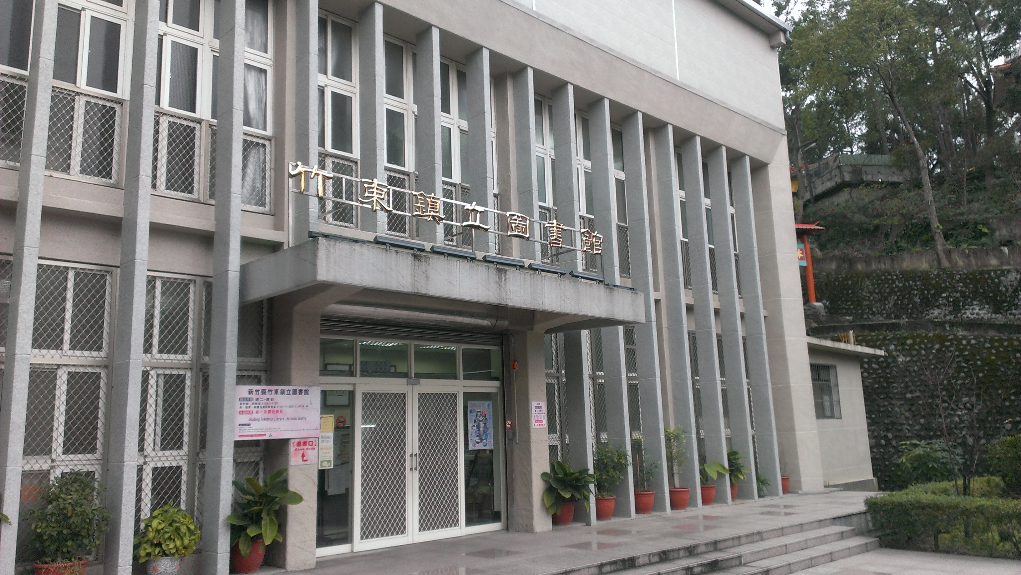 中文（台灣）: 圖書館A棟。